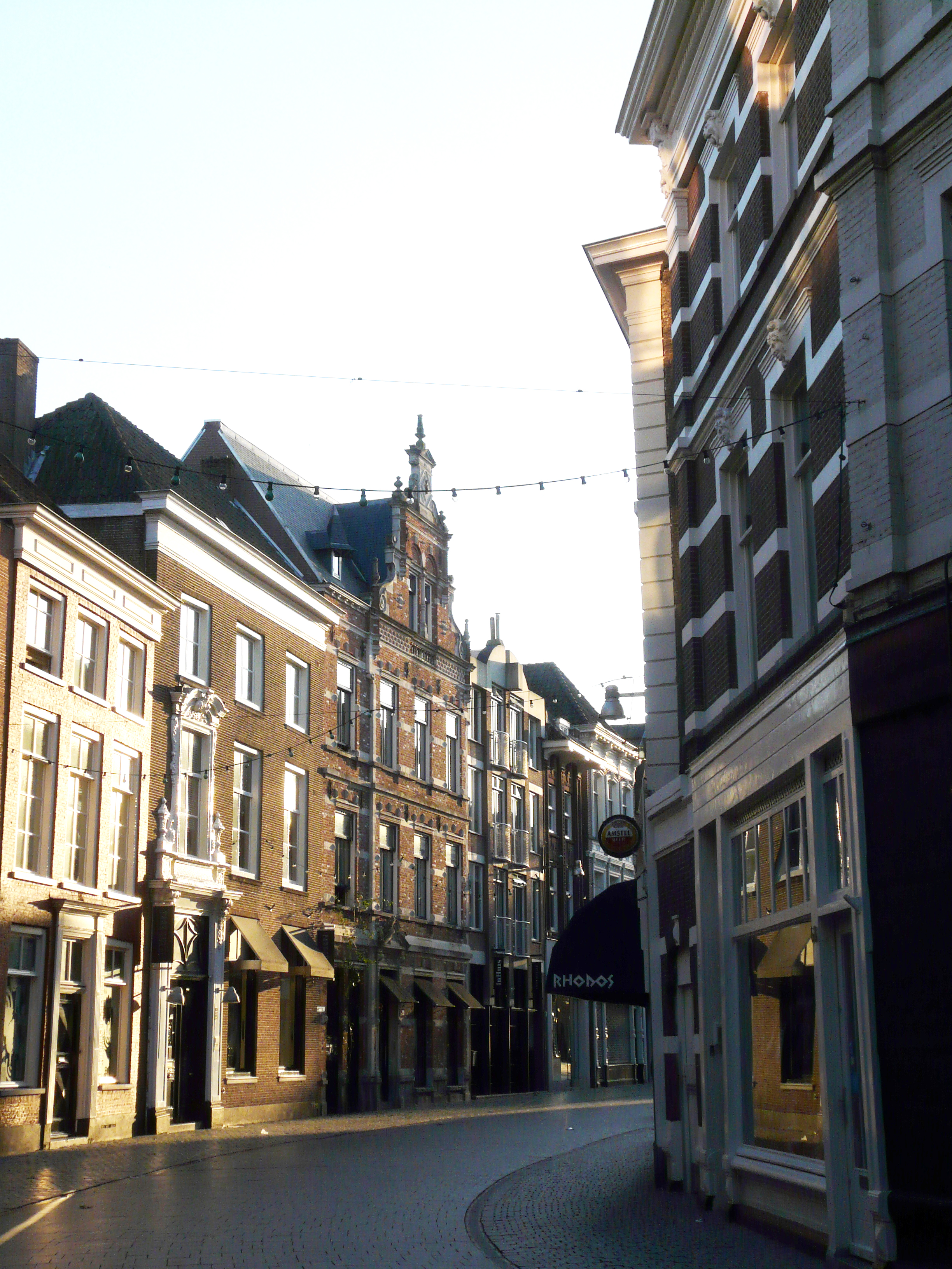 Zicht op een deel van de Veemarktstraat, Breda in Breda Centrum